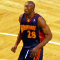 D.J. Mbenga in 2007.